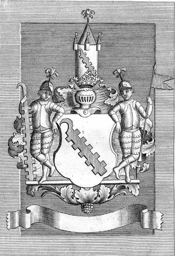 Wappen der Familie von Donop